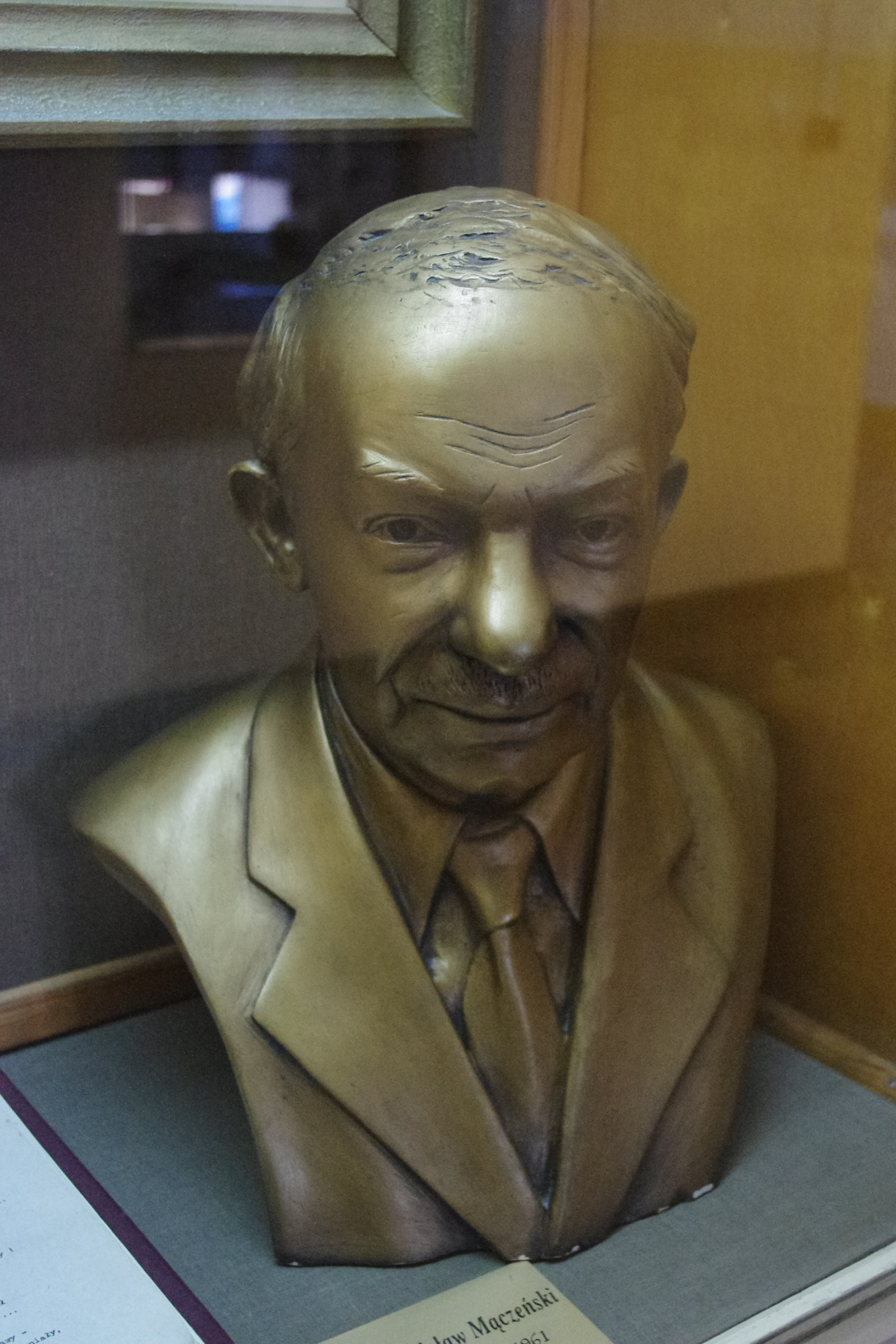 Popiersie Zdzisława Mączeńskiego w Technikum Budowlanym nr 1 im. Zdzisława Mączeńskiego przy ul. Górnośląskiej 31 w Warszawie